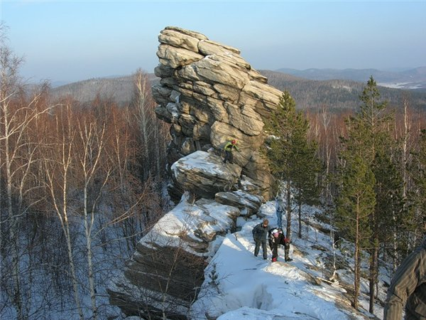 памятник природы